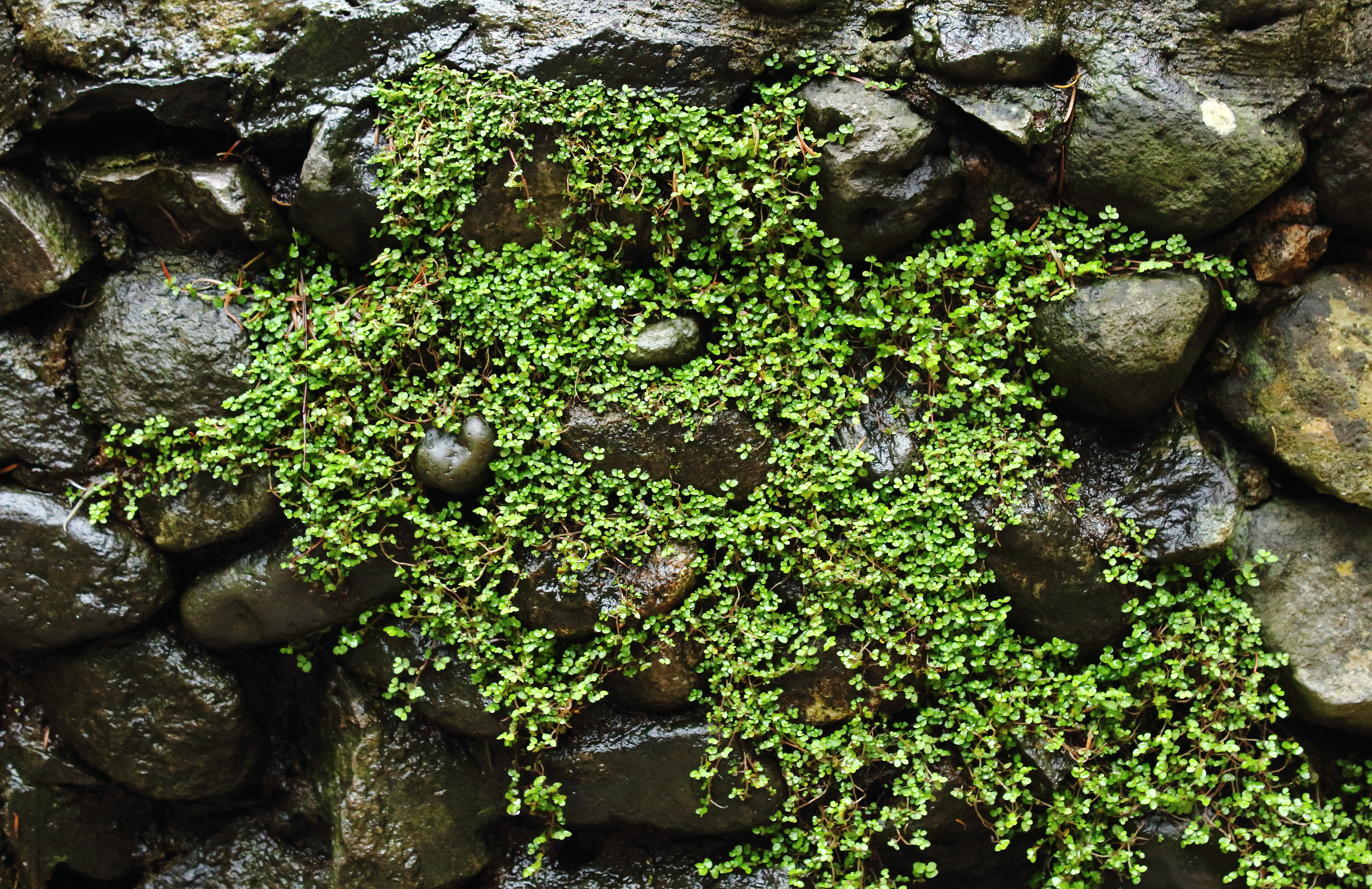 Rocas con humedad.